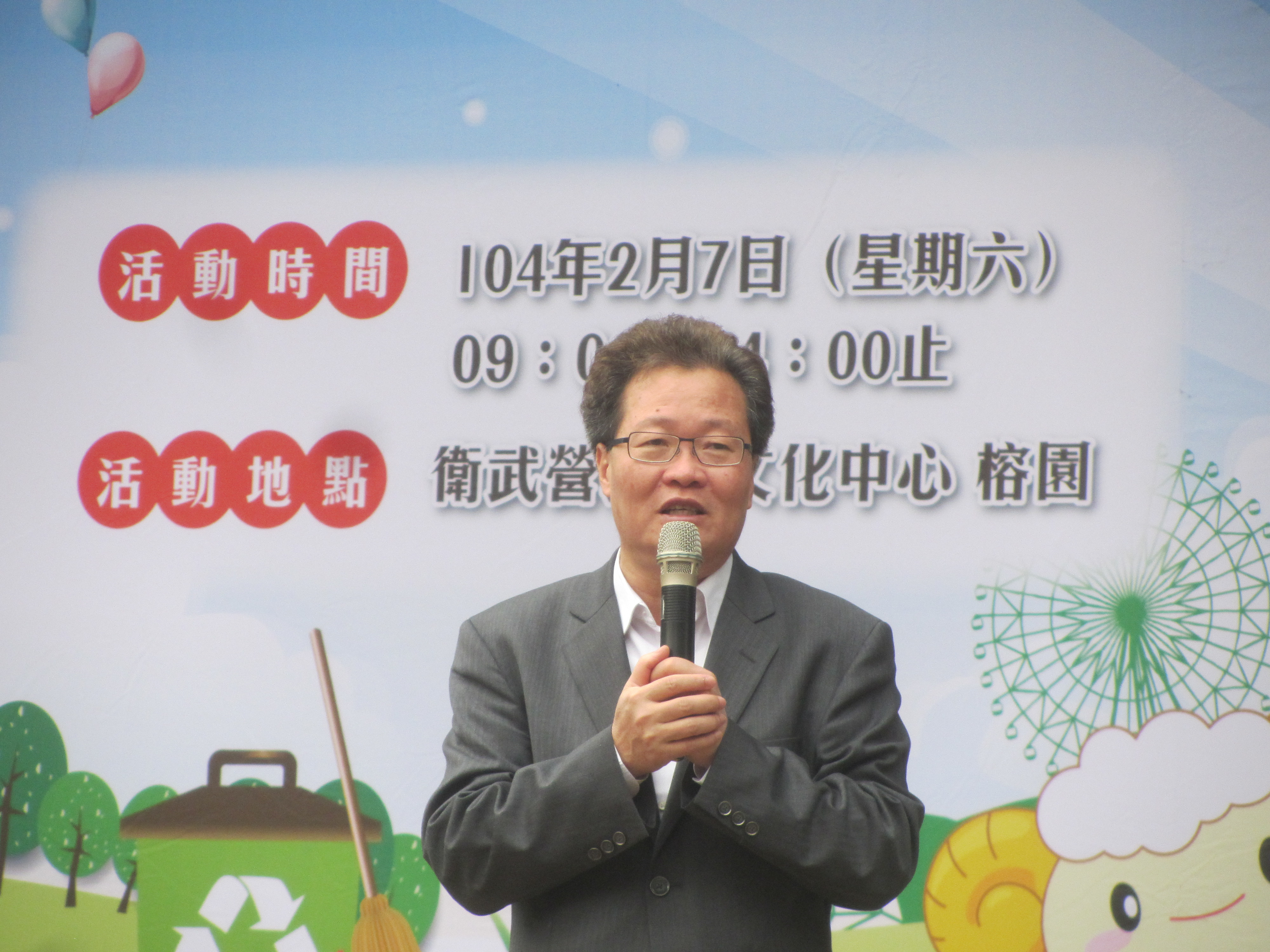 高雄市副市長陳金德